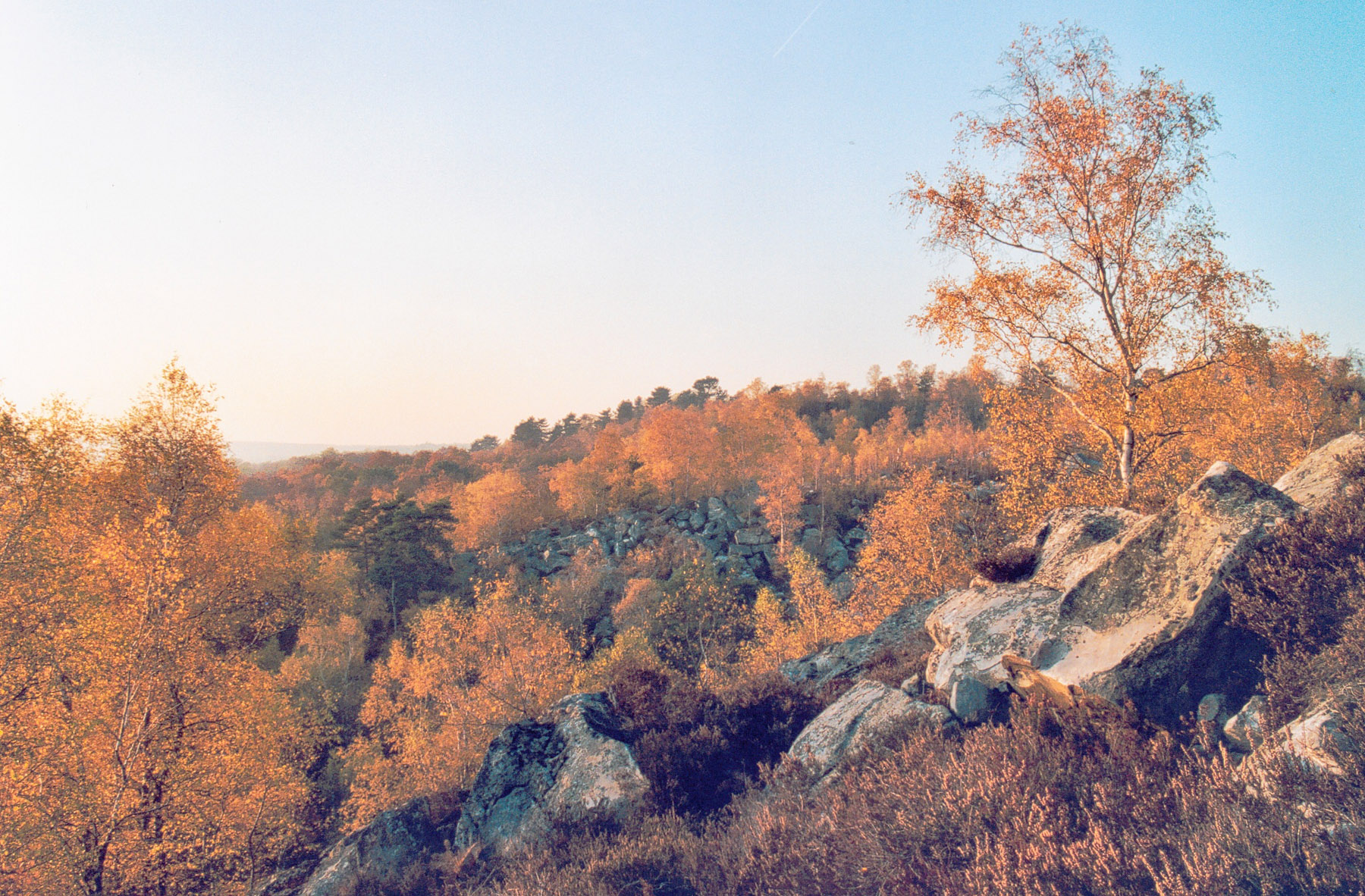 La forêt de Fontainebleau à l'automne Auteur : GIRAUD Patrick